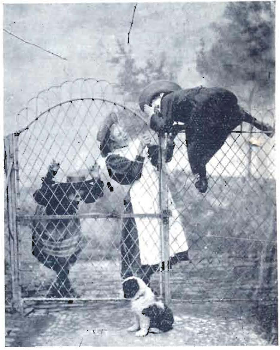 Fotografía de niños por Jhon Fitz-Patrick